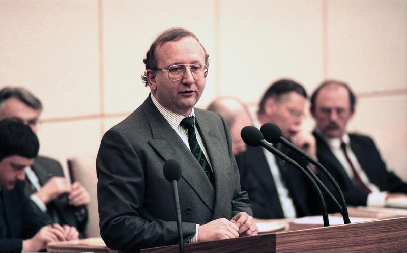 Bonn, 14.12.1990 In der ersten Sitzung des gesamtdeutschen Bundesrates in Bonn traf die Länderkammer die Entscheidung, die Beamtenbesoldung in den neuen Bundesländern für den Bereich der leitenden Beamten zu verbessern. Die neuen Bundesländer sollen ermächtigt werden, die im Einigungsvertrag vorgesehenen 35% eines entsprechenden westdeutschen Gehaltes durch einen nicht ruhegehaltsfähigen Zuschuß von 14% aufzustocken. Die Entscheidung des Bundesrates muß durch die Bundesregierung in Kraft gesetzt werden.